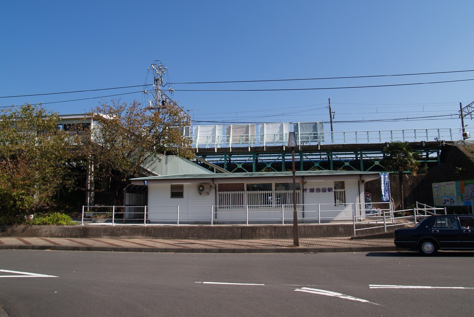 片瀬白田駅